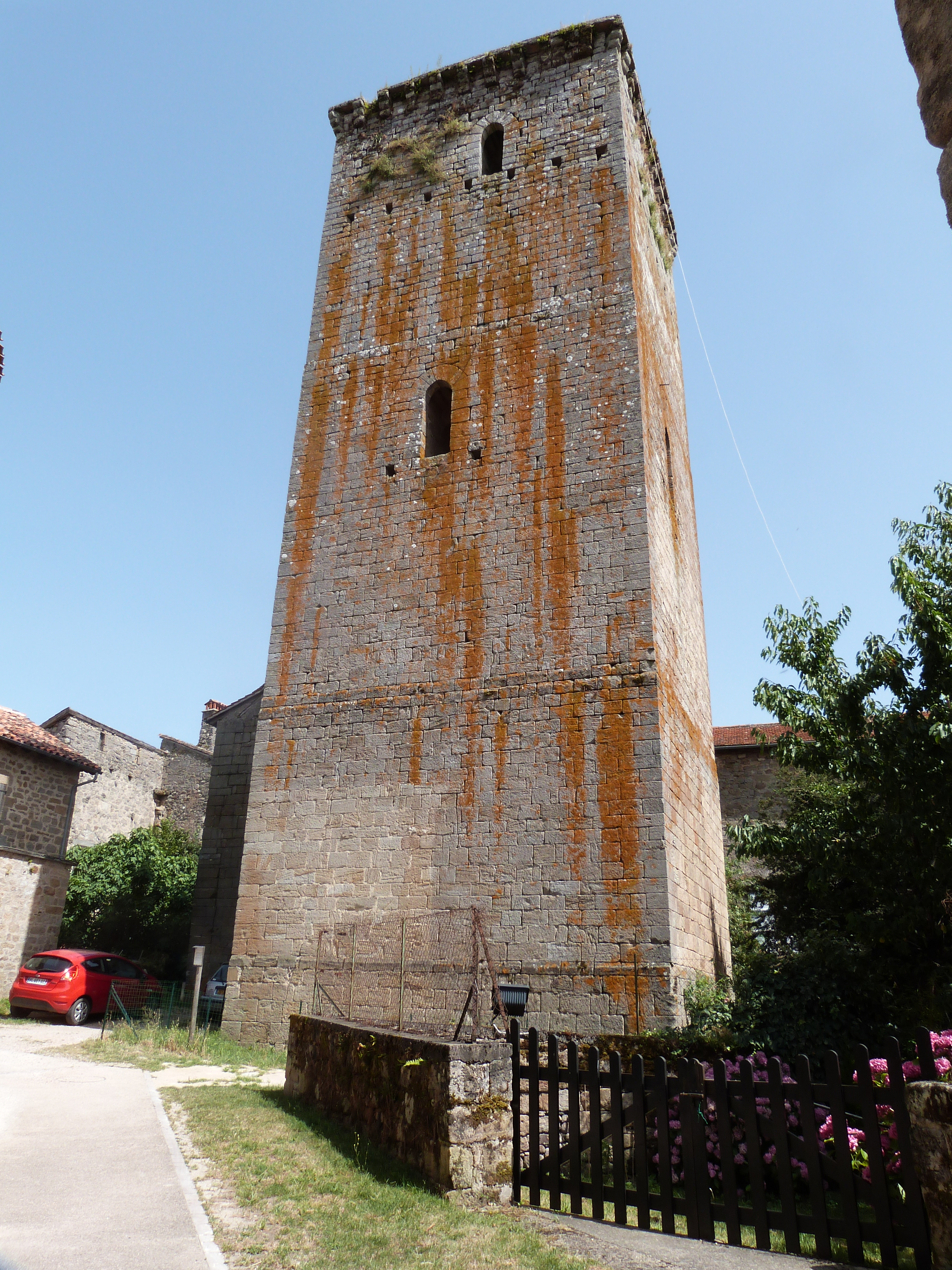 Tour de l'Horloge (Inscrit) .